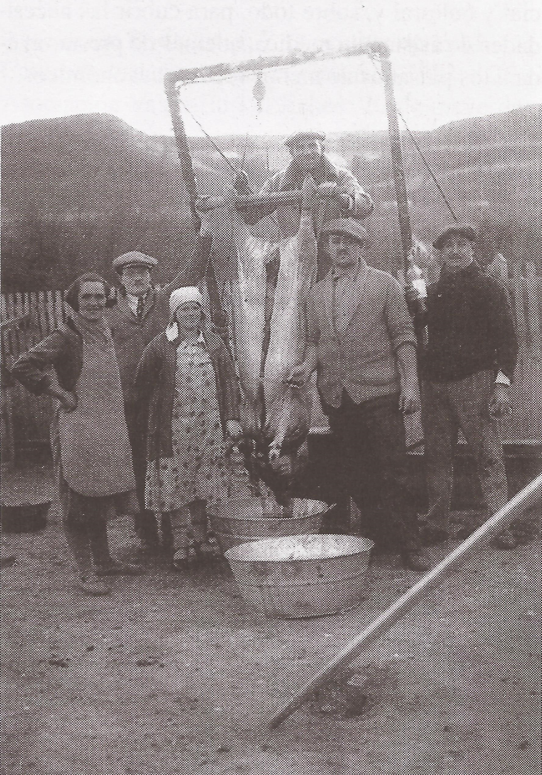 Vida cotidiana de inmigrantes checos en Comodoro Rivadavia, Chubut, Patagonia, Argentina